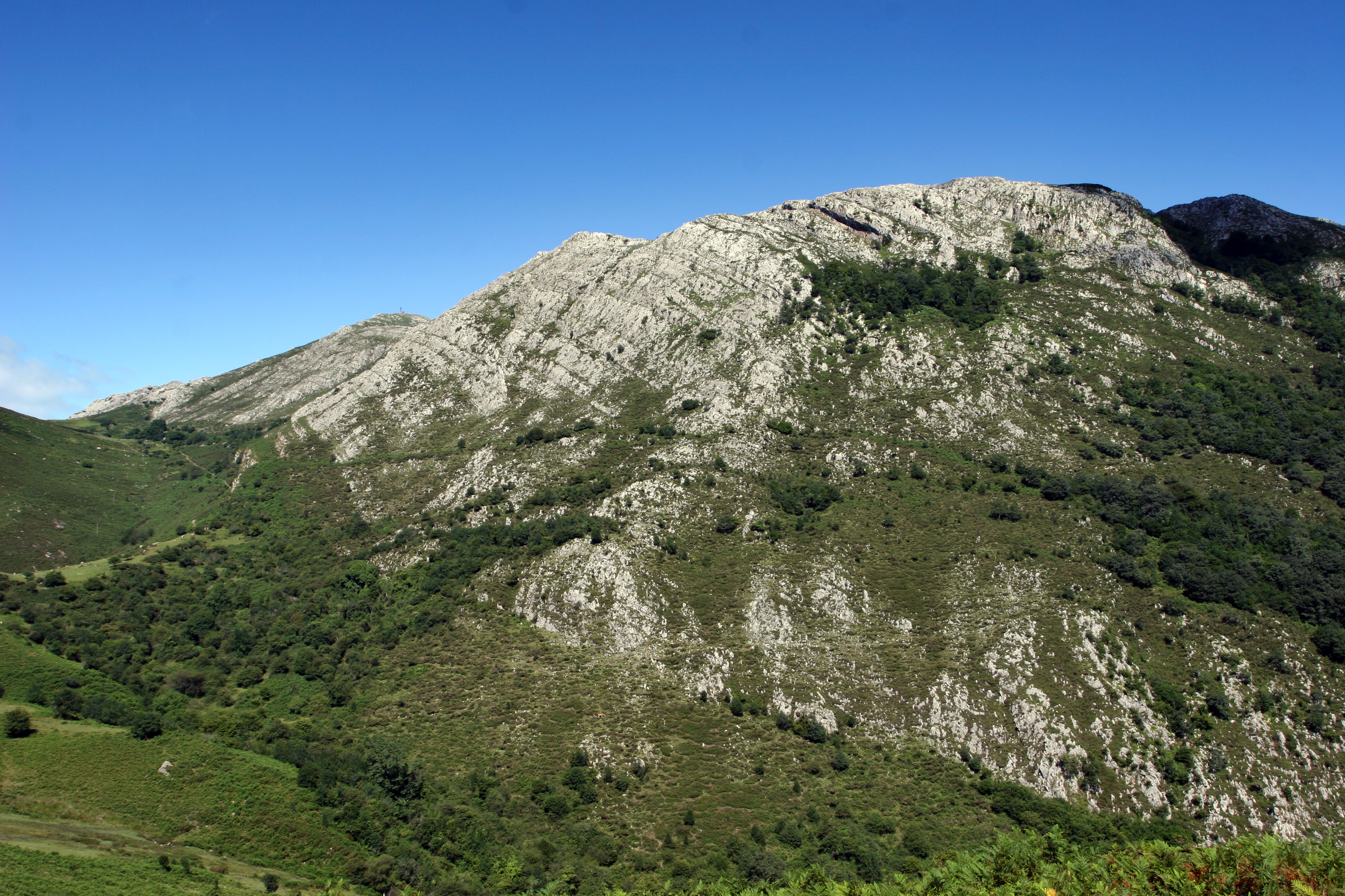 Vista desde la majada denominada El Bustacu, hacia el Picu Pienzu (Sierra del Sueve - Asturias) This is a photography of a Site of Community Importance in Spain with the ID: ES1200043. Natura2000 entry, EEA entry